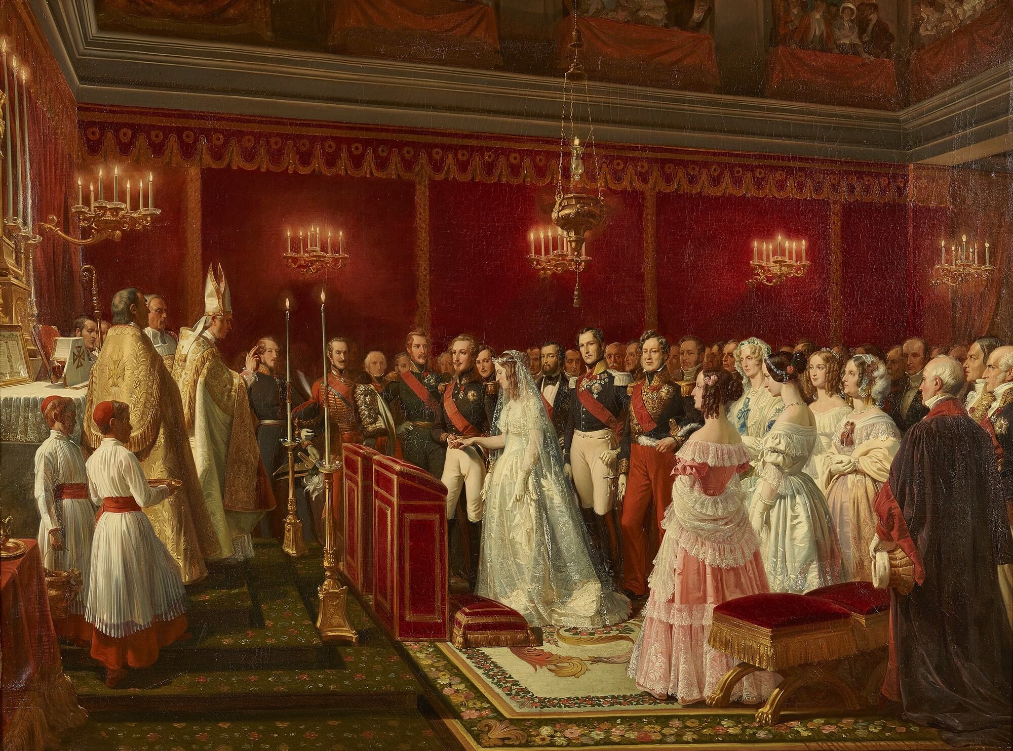 Mariage du duc de Nemours dans la chapelle du château de Saint-Cloud, 27 avril 1840